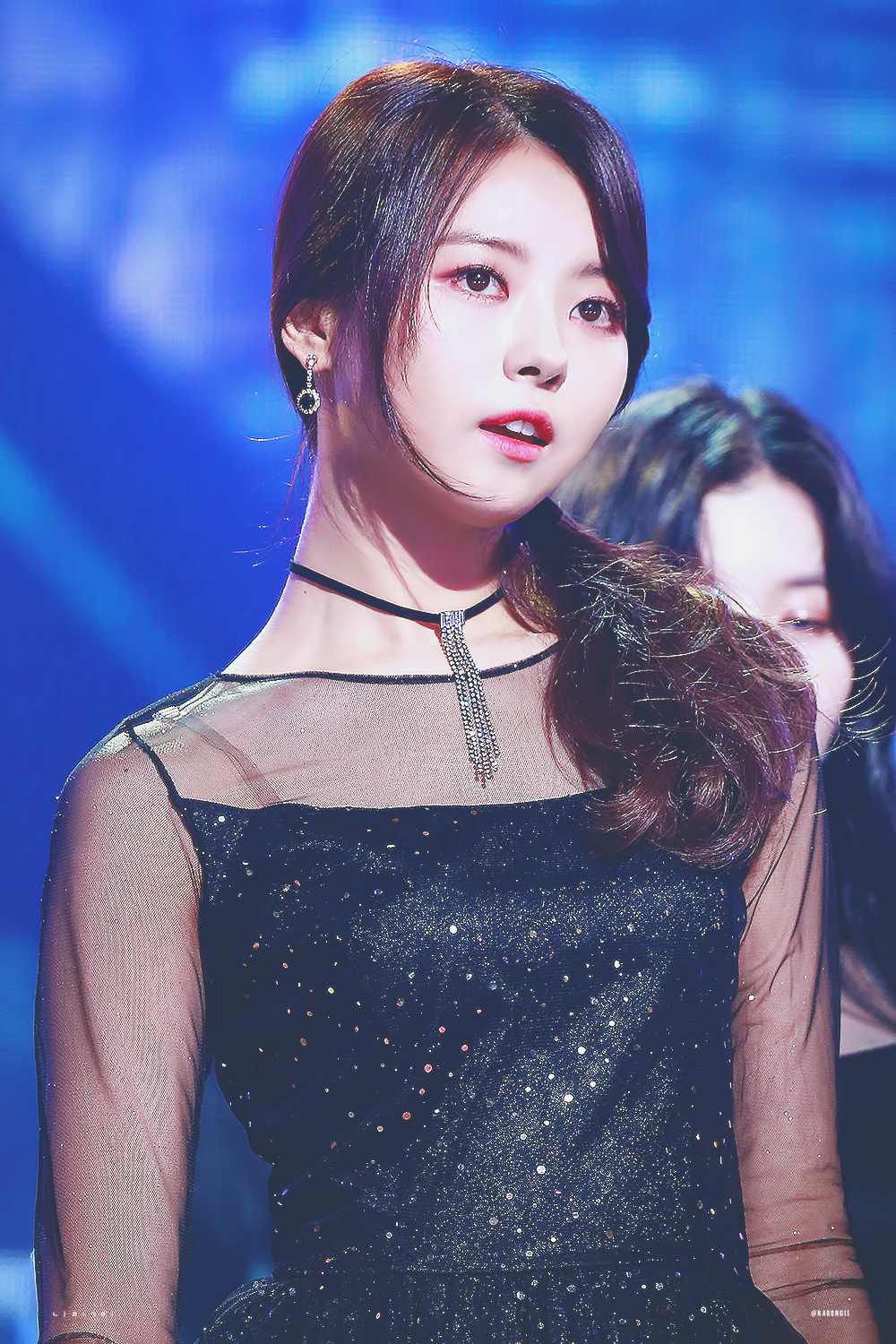 171231 가요대축제 공개홀 무대